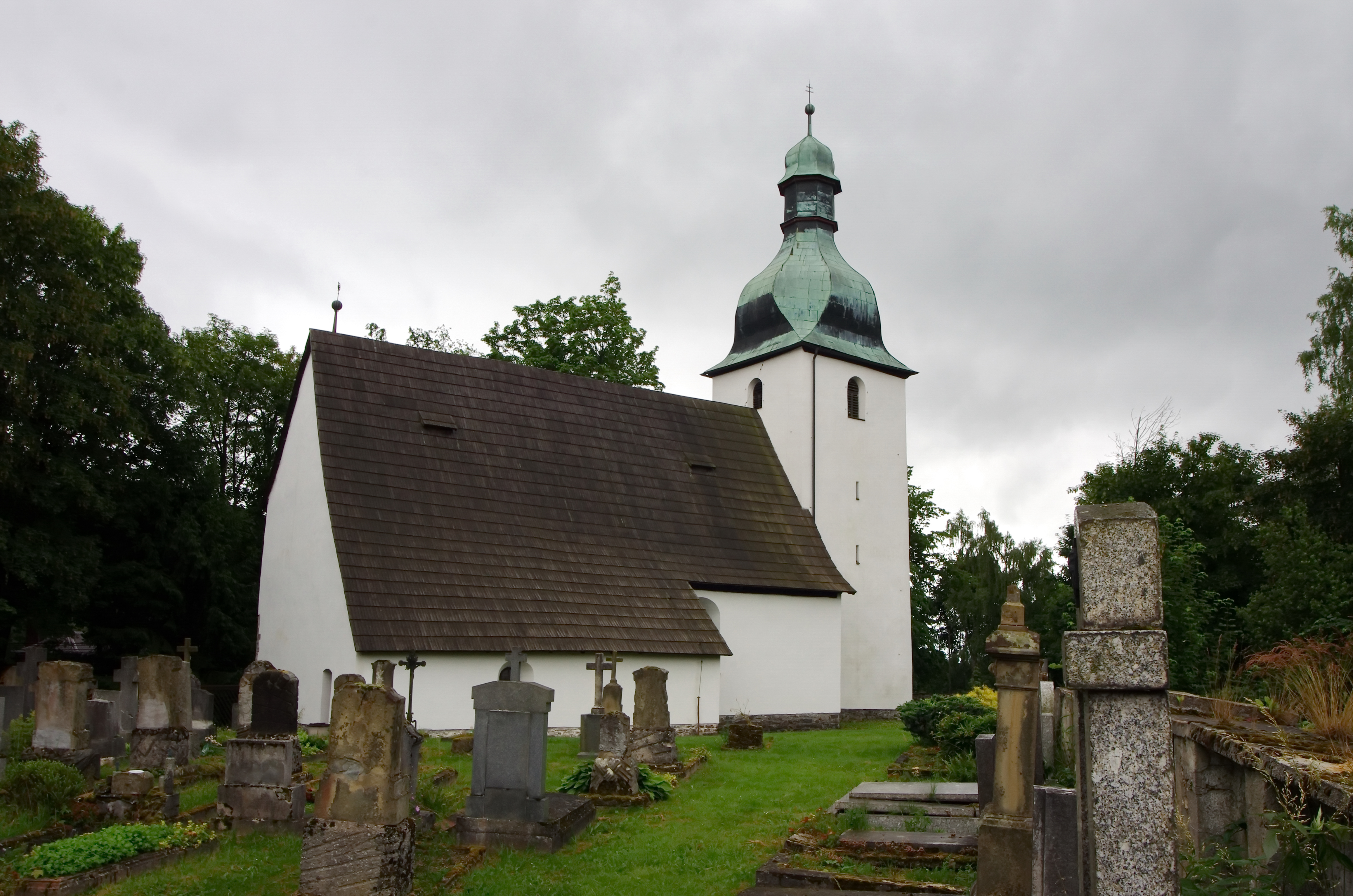 Kostel svatého Jiljí v Kostelní, části obce Kraslice